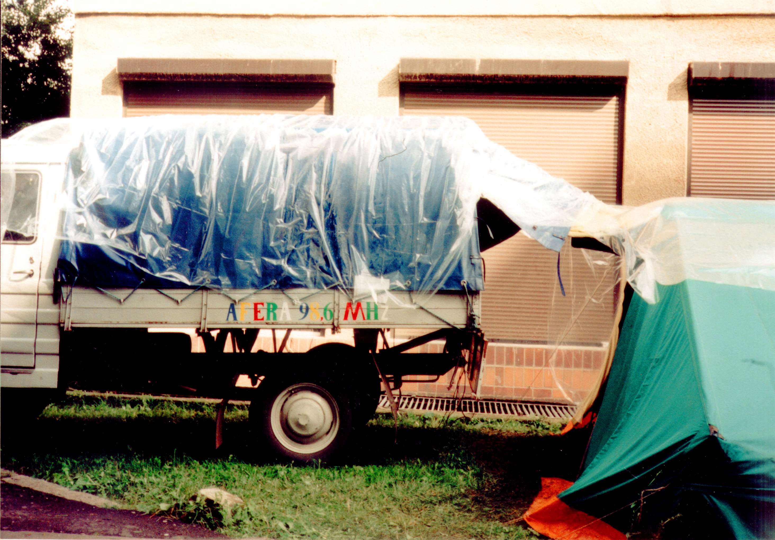 Radio Afera nadale z samochodu dostawczego